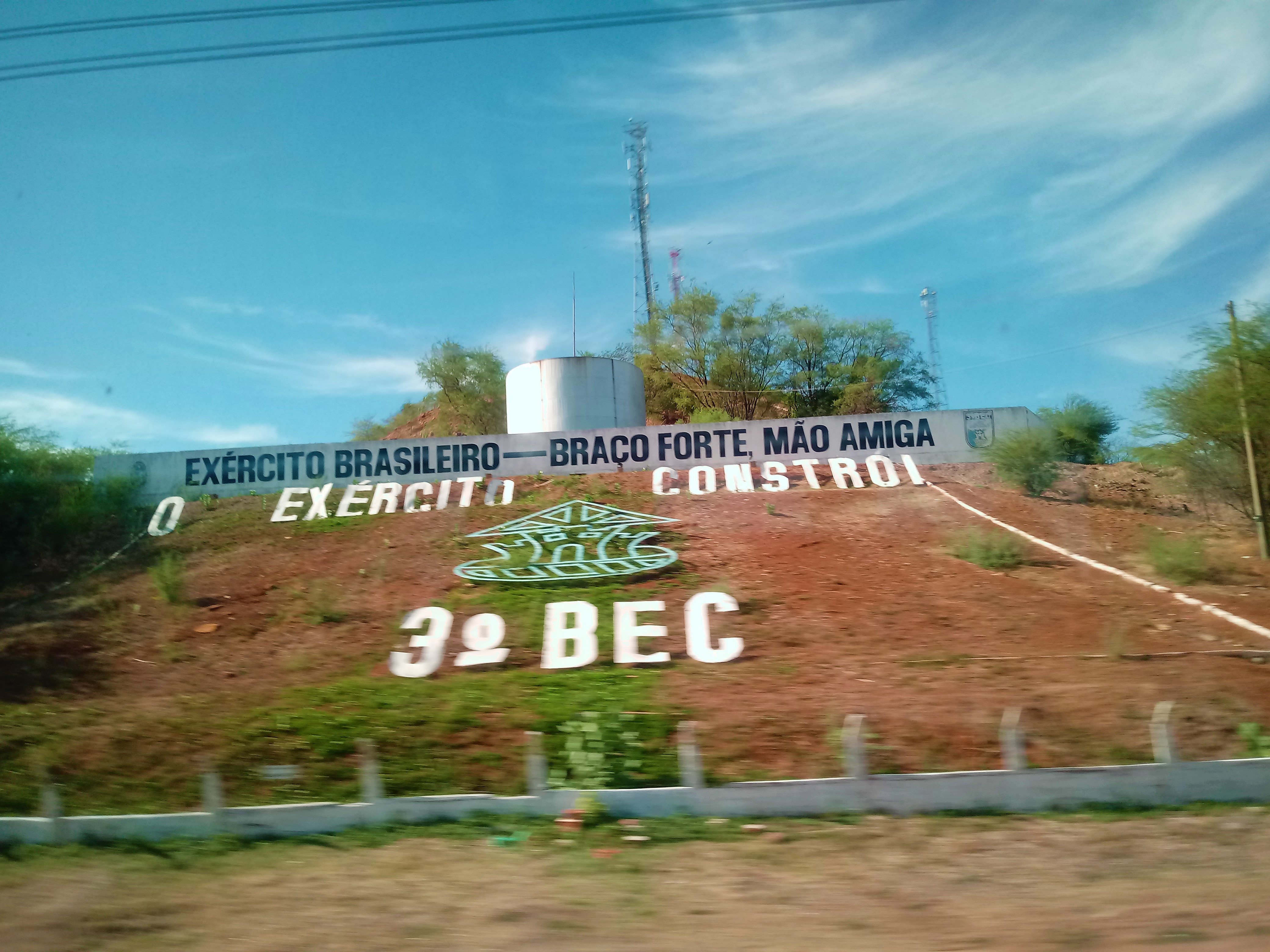 Colina do 2.º Batalhão de Engenharia de Construção, em Picos.